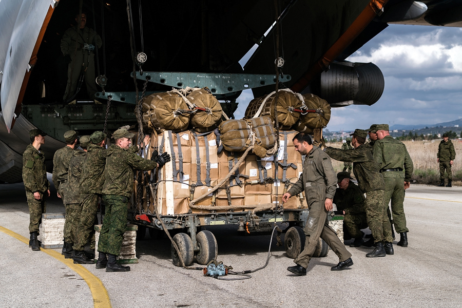 Будни ВКС РФ на авиабазе Химеймим в Сирии